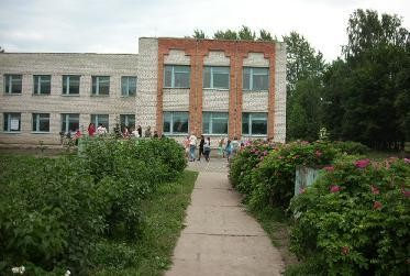 Климовская средняя школа Ибресинского района